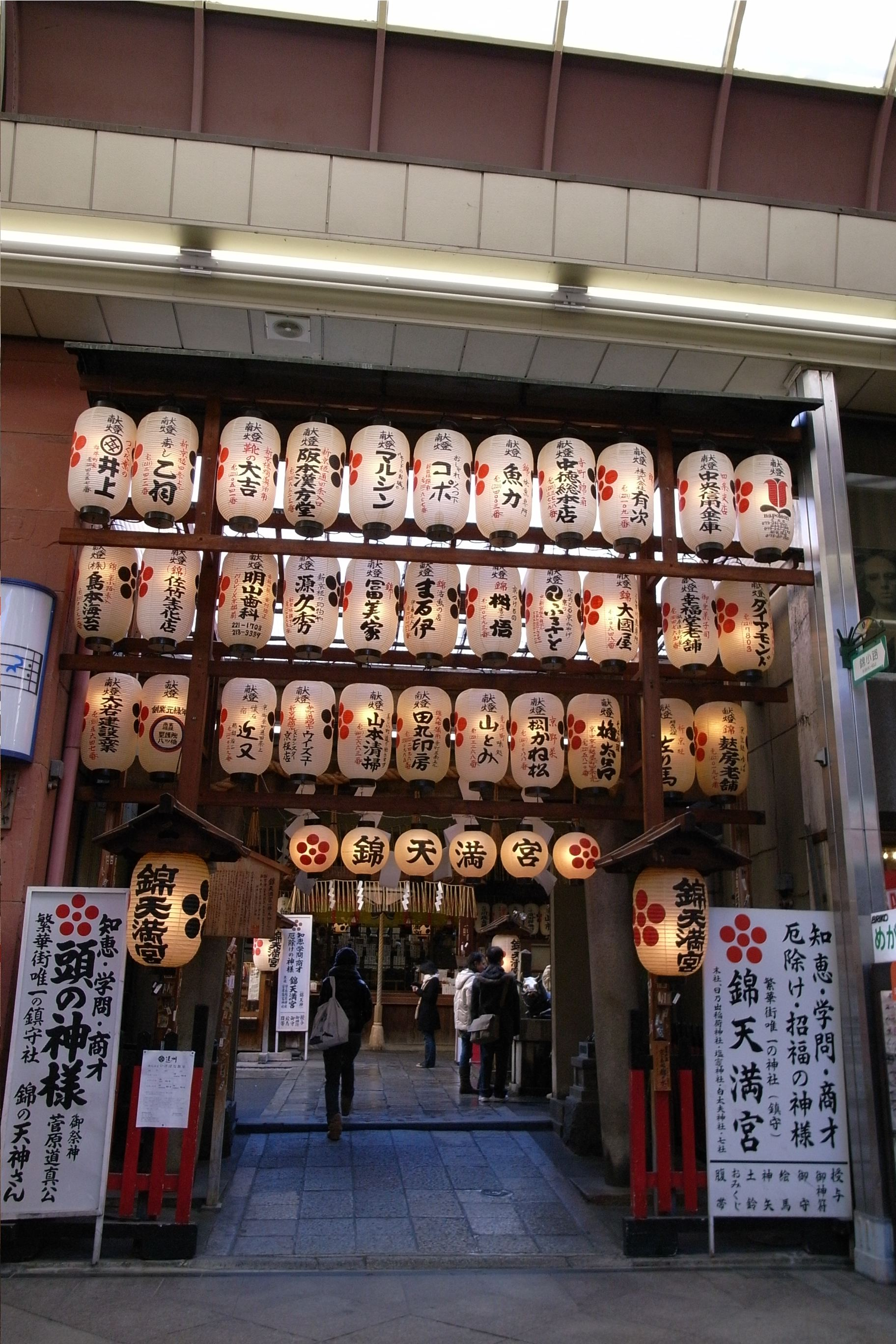 Nishiki Tenmangu in Nakagyo, Kyoto, Japan.